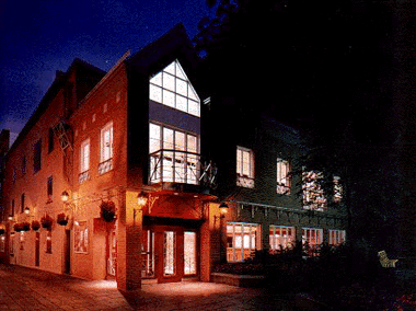 Théâtre Petit Champlain à Québec.